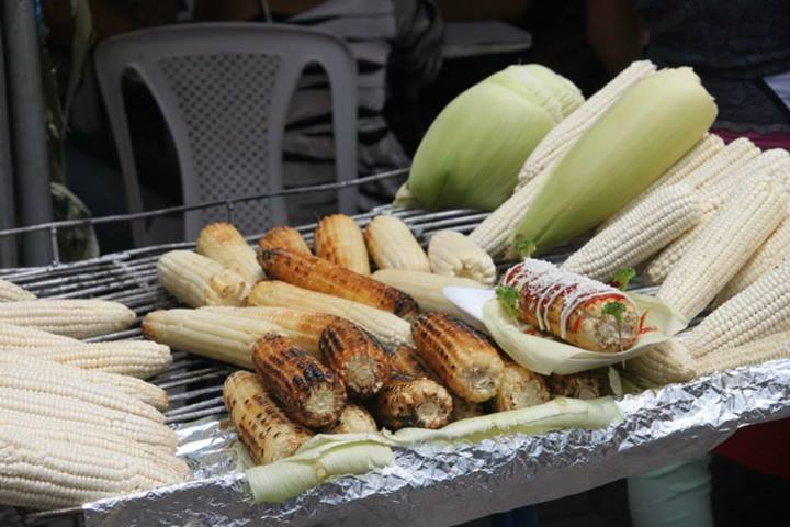 Feria del maíz en Matagalpa